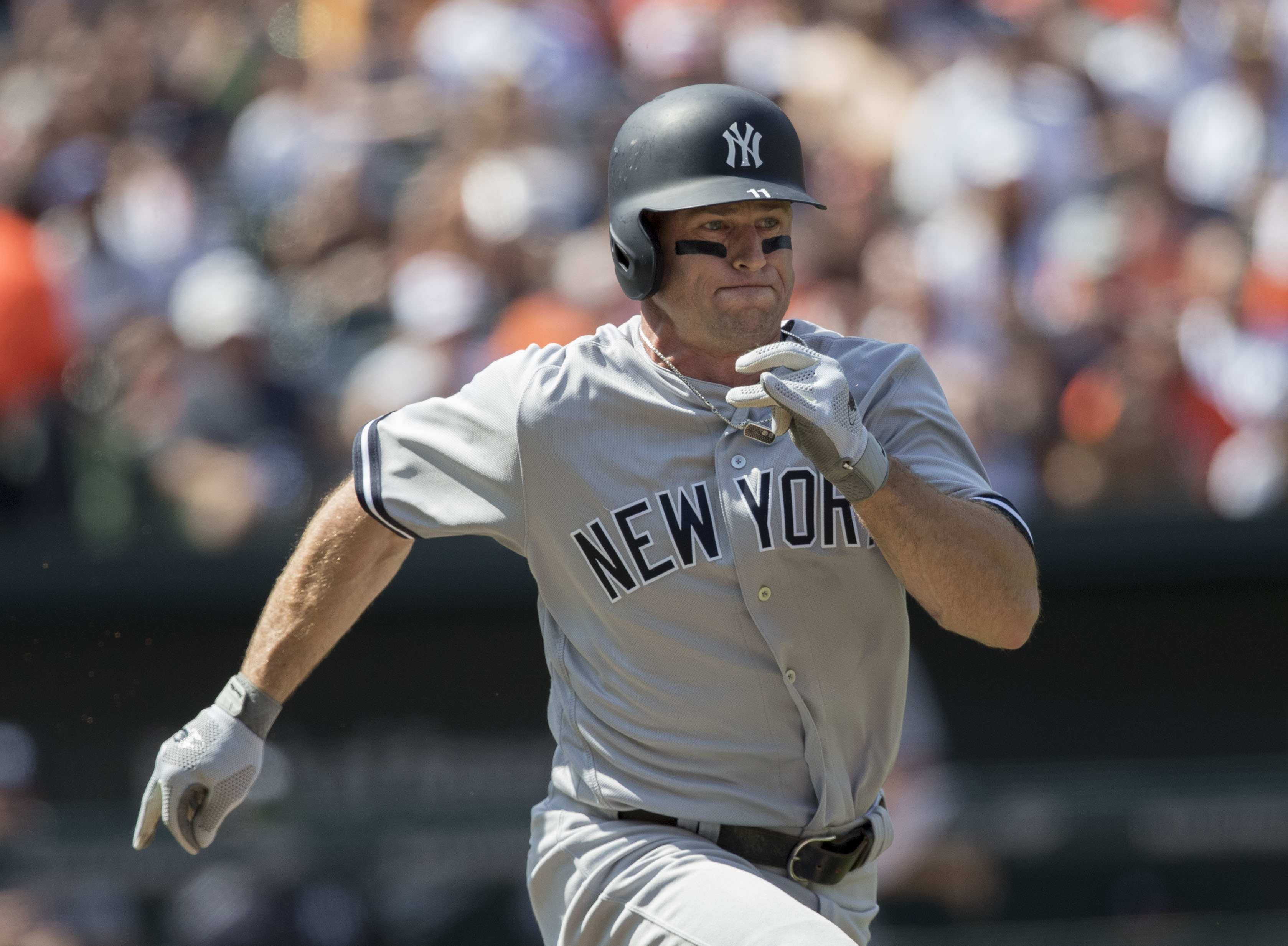 Yankees at Orioles 9/4/17